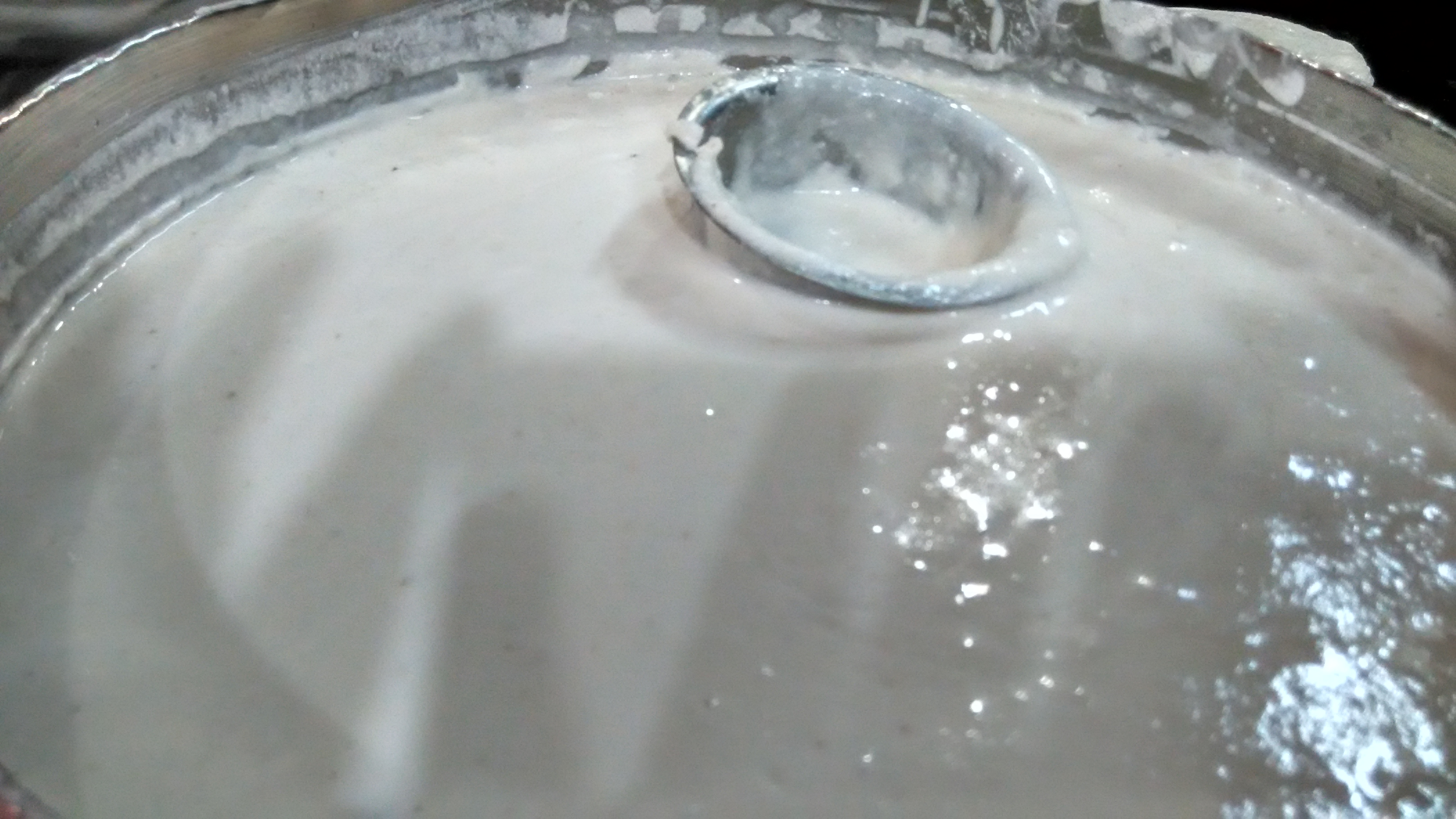 இட்டவி மாவு அல்லது. இட்லி மாவு.